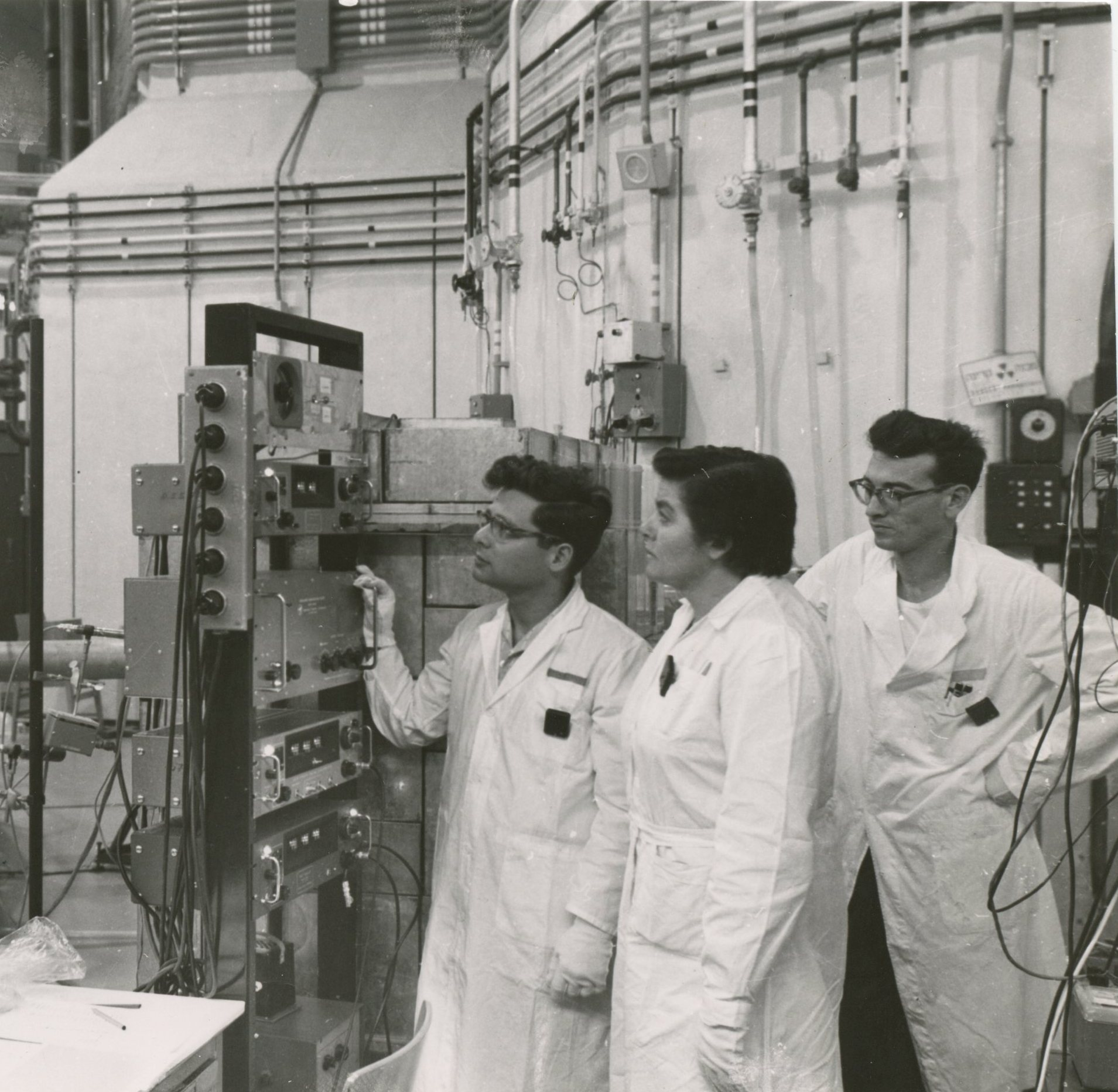 מדענית הגרעין אביבה גלעדי, חוקרת בטכניון, בעת עבודה עם קולגות במרכז למחקר גרעיני בנחל שורק